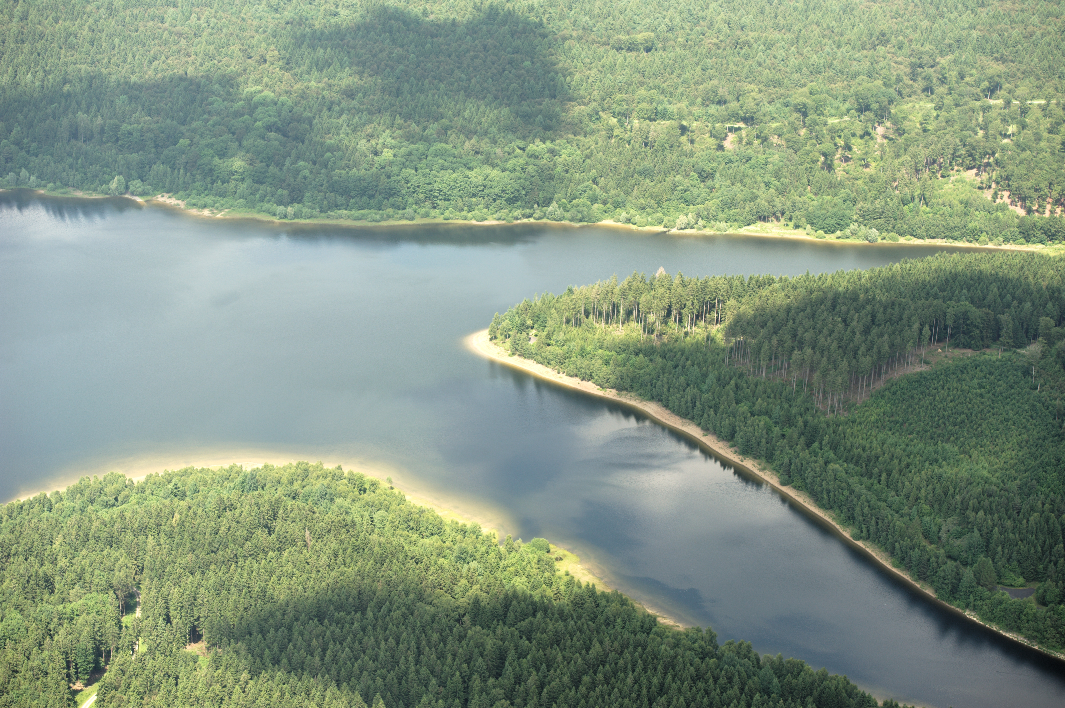 Luftaufnahme Aabachsee, Bad Wünnenberg, Kreis Paderborn (im Rahmen des Fotoflugs Sauerland-Ost) The making of this document was supported by the Community-Budget of Wikimedia Germany.